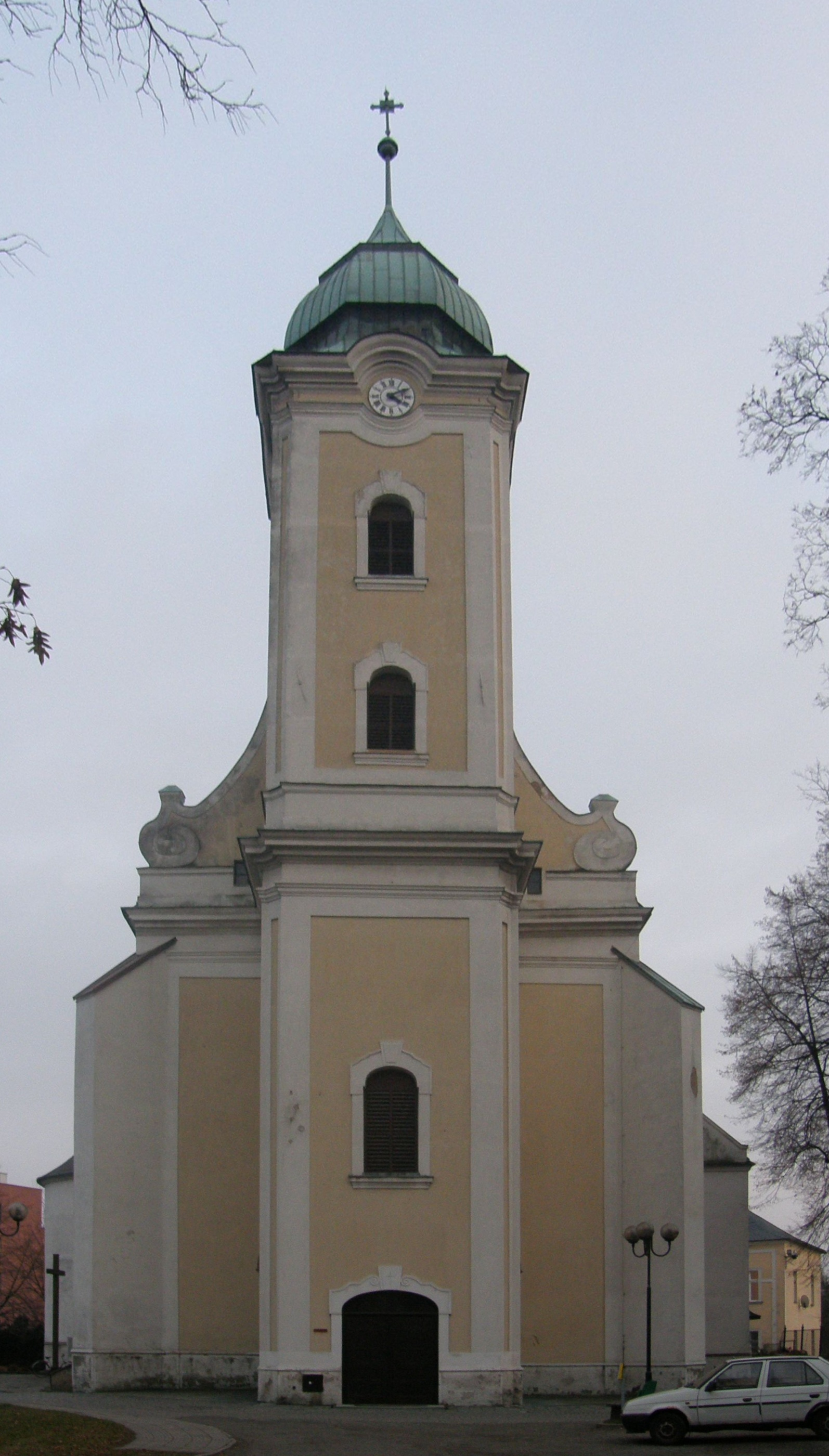 Kostel Jana Křtitele v Hlučíně